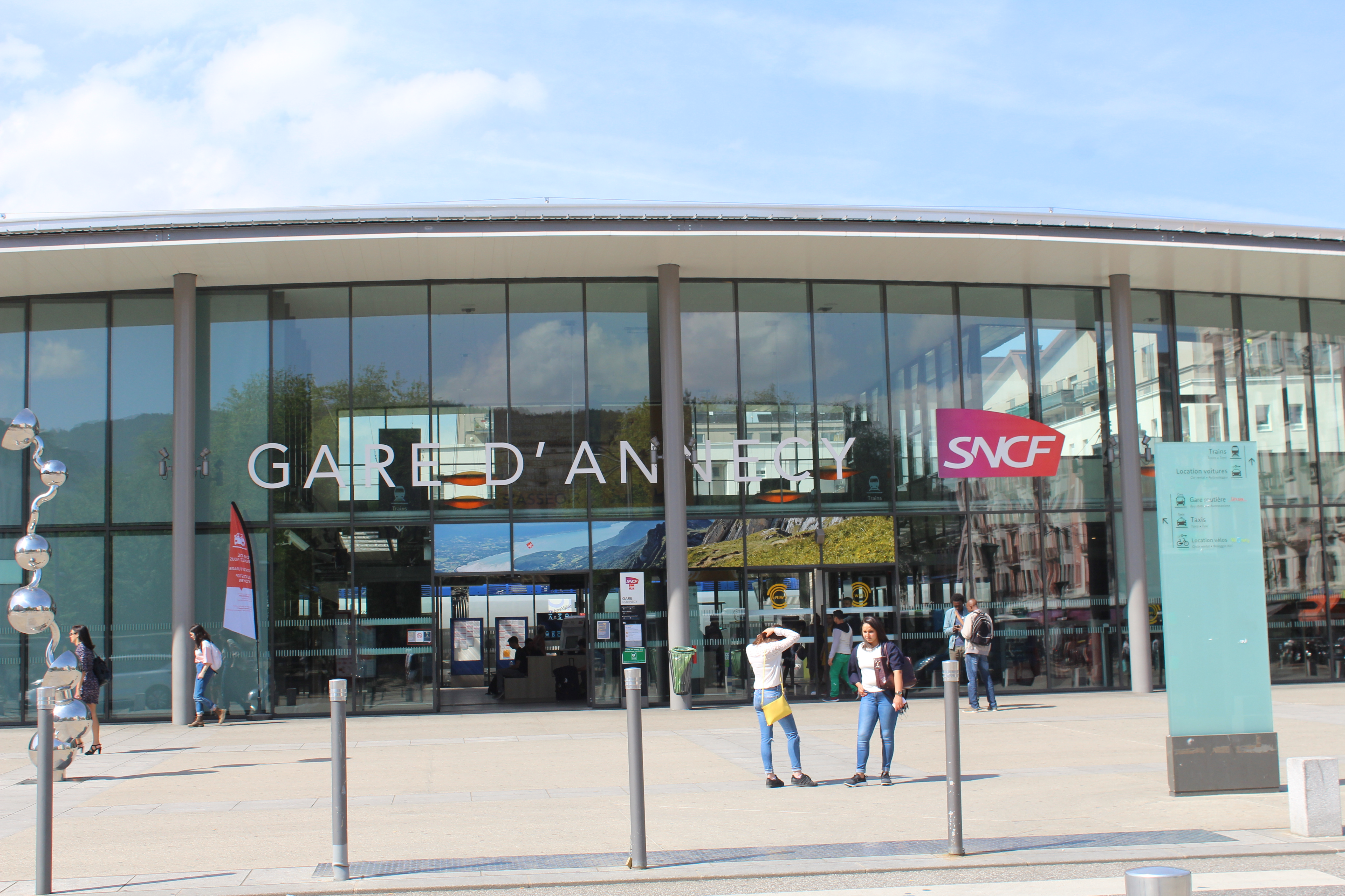 Gare d'Annecy.